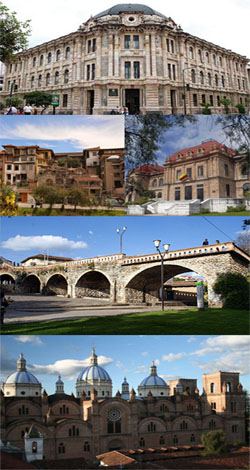 Corte Provincial de Justicia del Azuay, Colegio-Museo Benigno Malo, Casas frente al río tomebamba, Puente Roto, Catedral de la Inmaculada Concepción